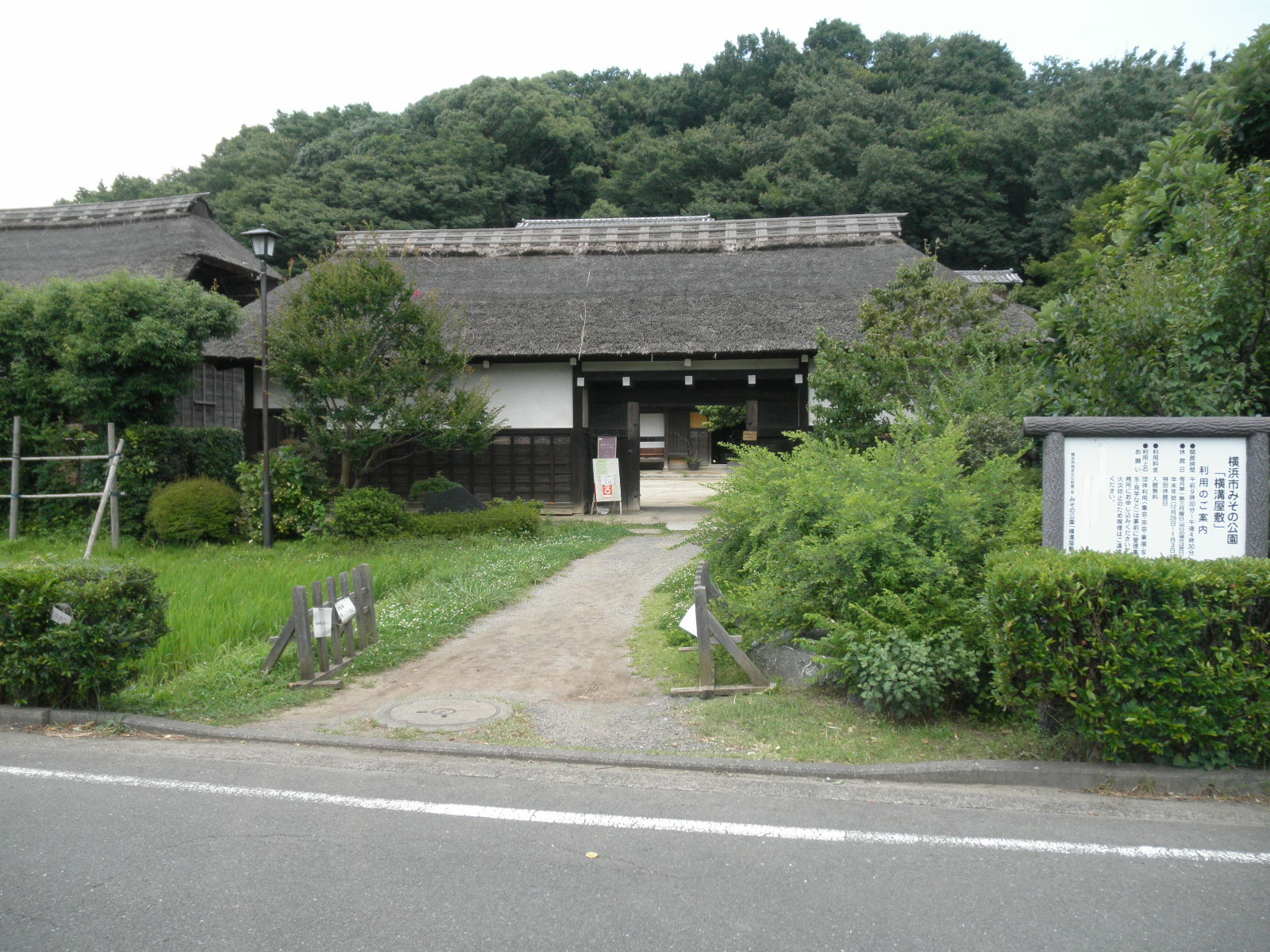 横浜市農村生活館 獅子ケ谷横溝屋敷